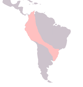 Carte de répartition du Bombus baeri